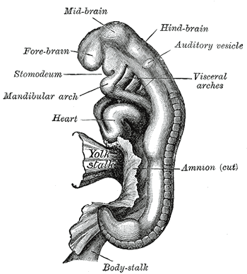 Human embryo between eighteen and twenty-one days old. (His.)